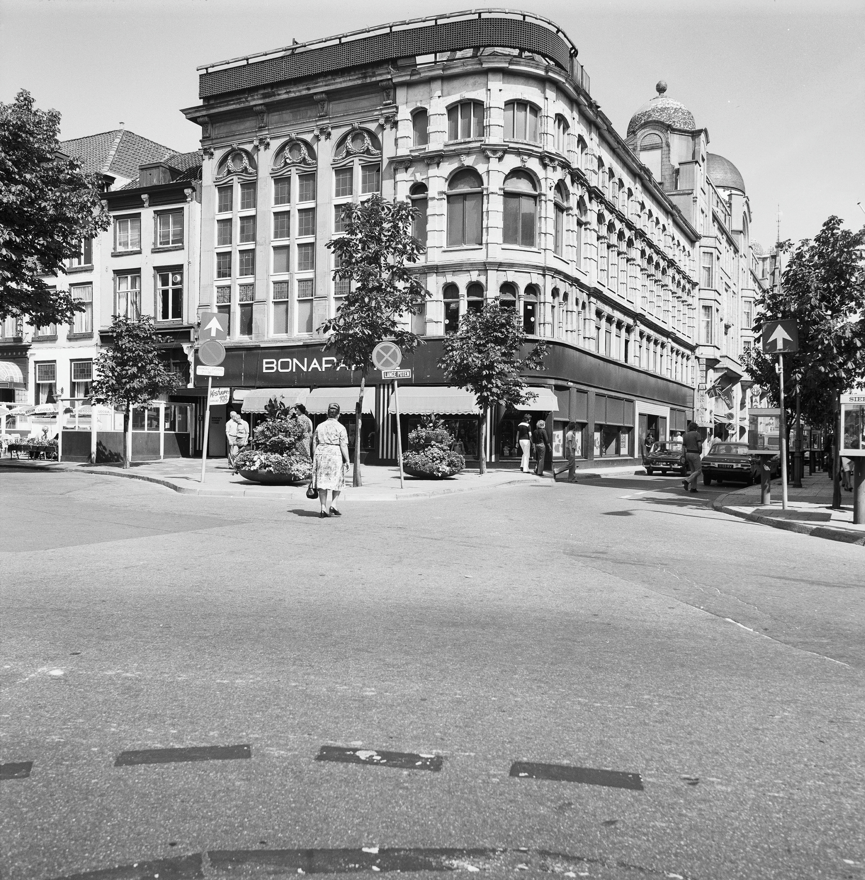 hoek Hofstraat